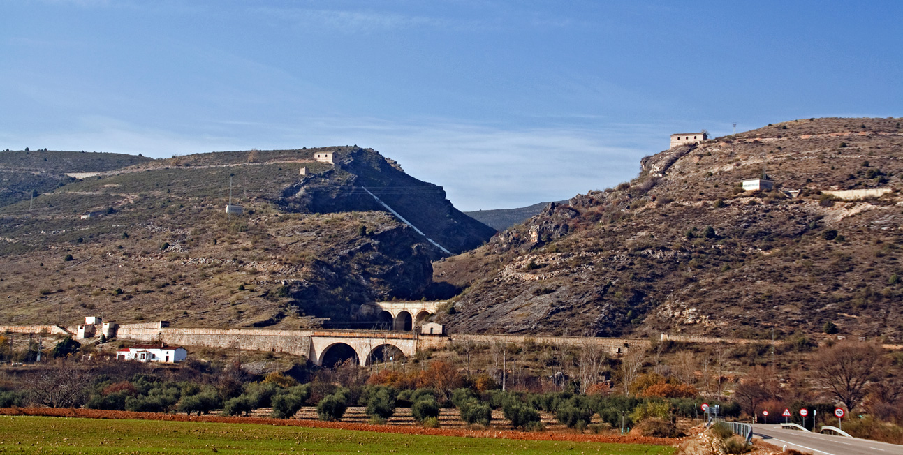 El arroyo de Las Cuevas es salvado por los tres canales que circulan paralelamente.